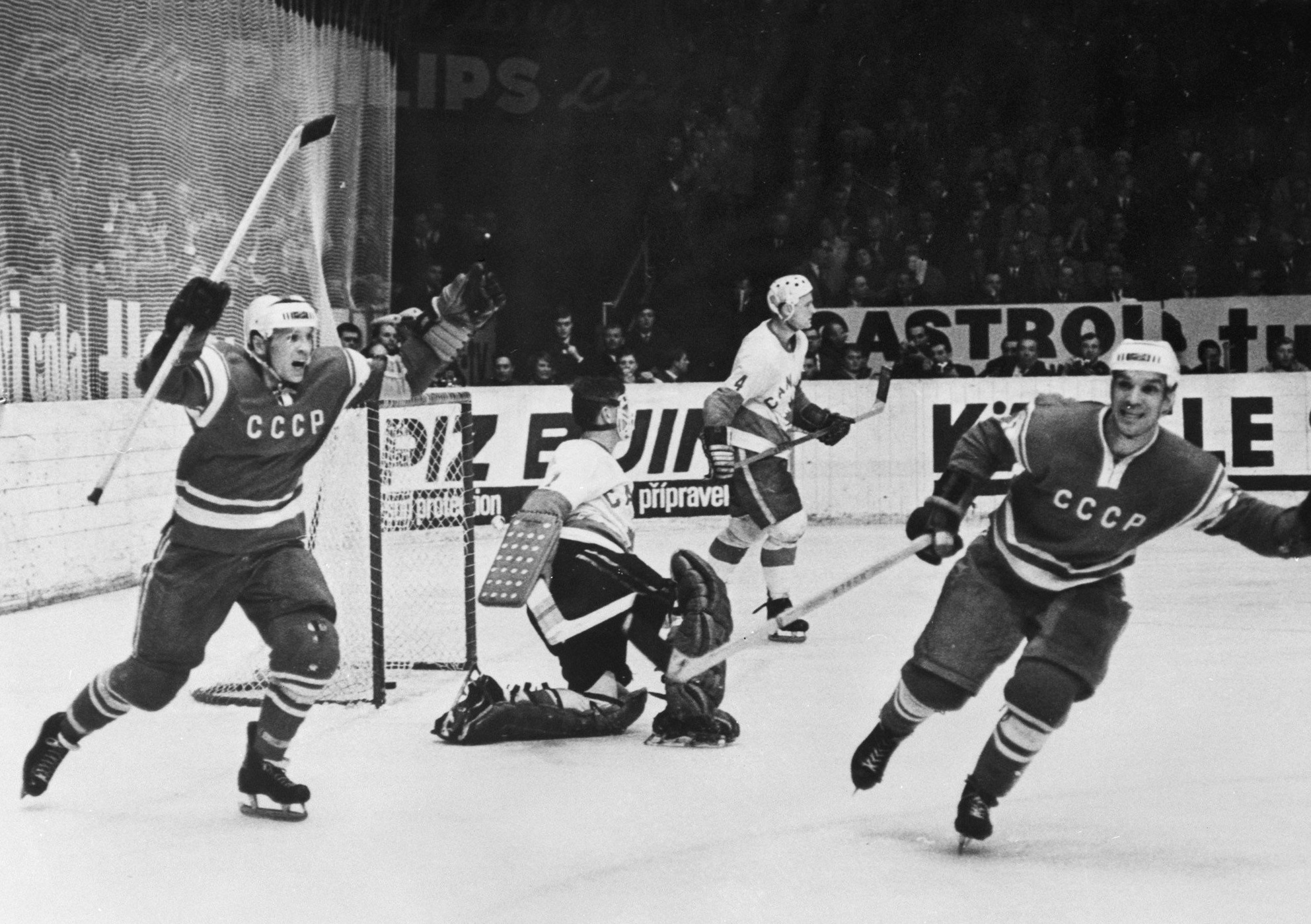 WK ijshockey te Wenen, wedstrijd Rusland tegen Canada 2-1 dolgelukkige Russen na de wedstrijd waardoor hun wereldtitel vaststond